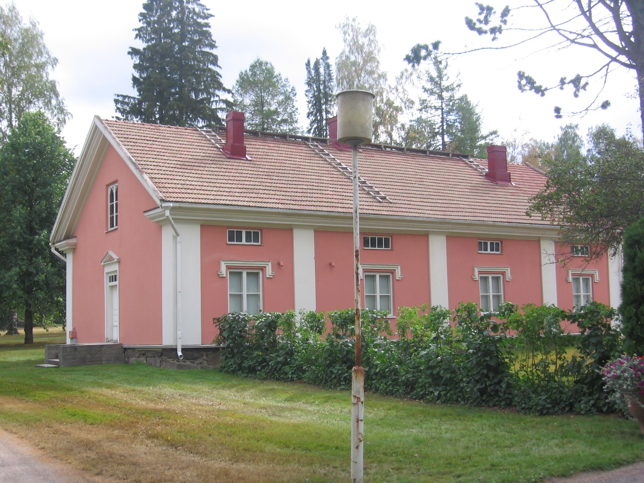 Törnävän kirkon palvelusväen asunto, punatulkkutalo